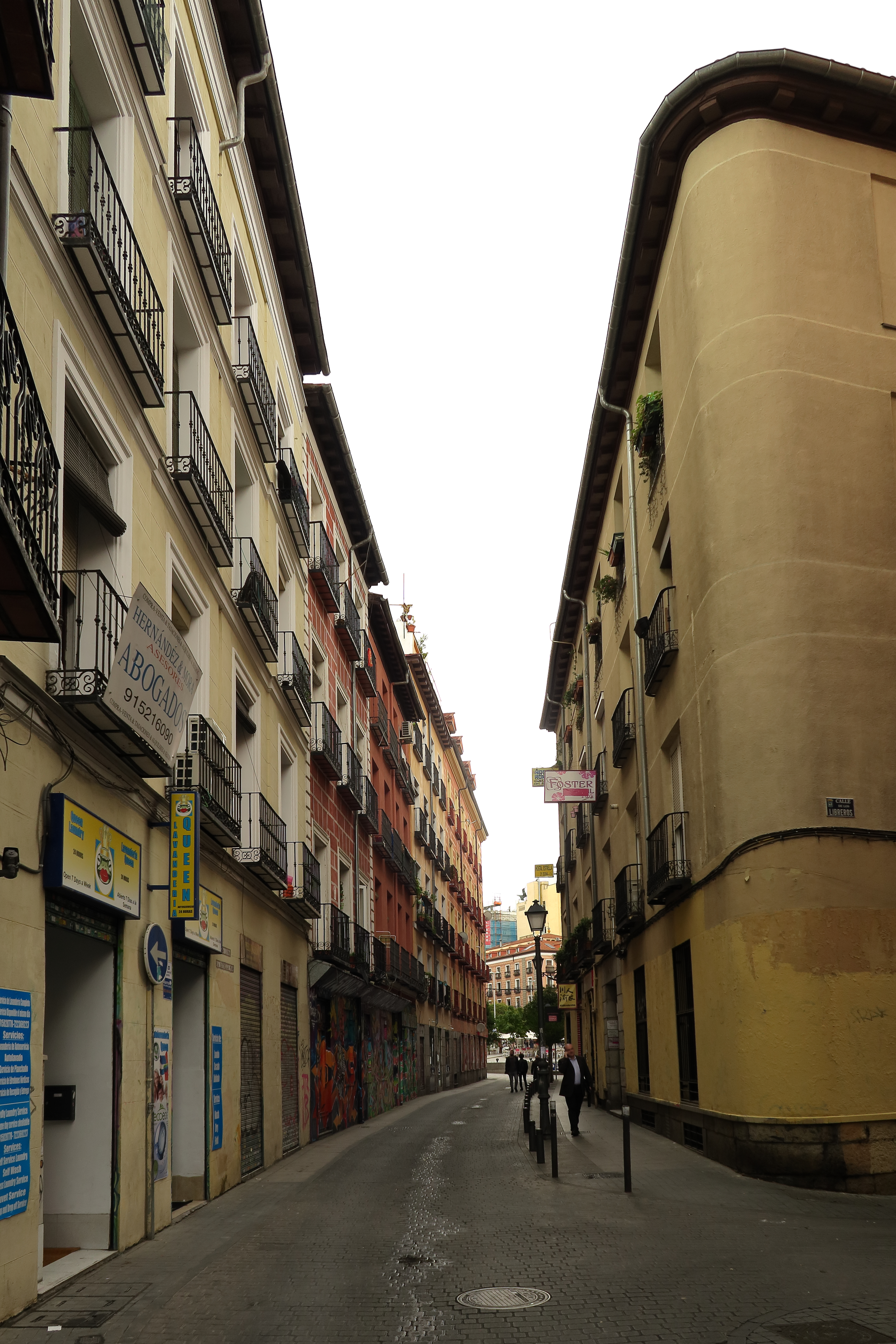 Calle de la Estrella, desde confluencia con calle Libreros